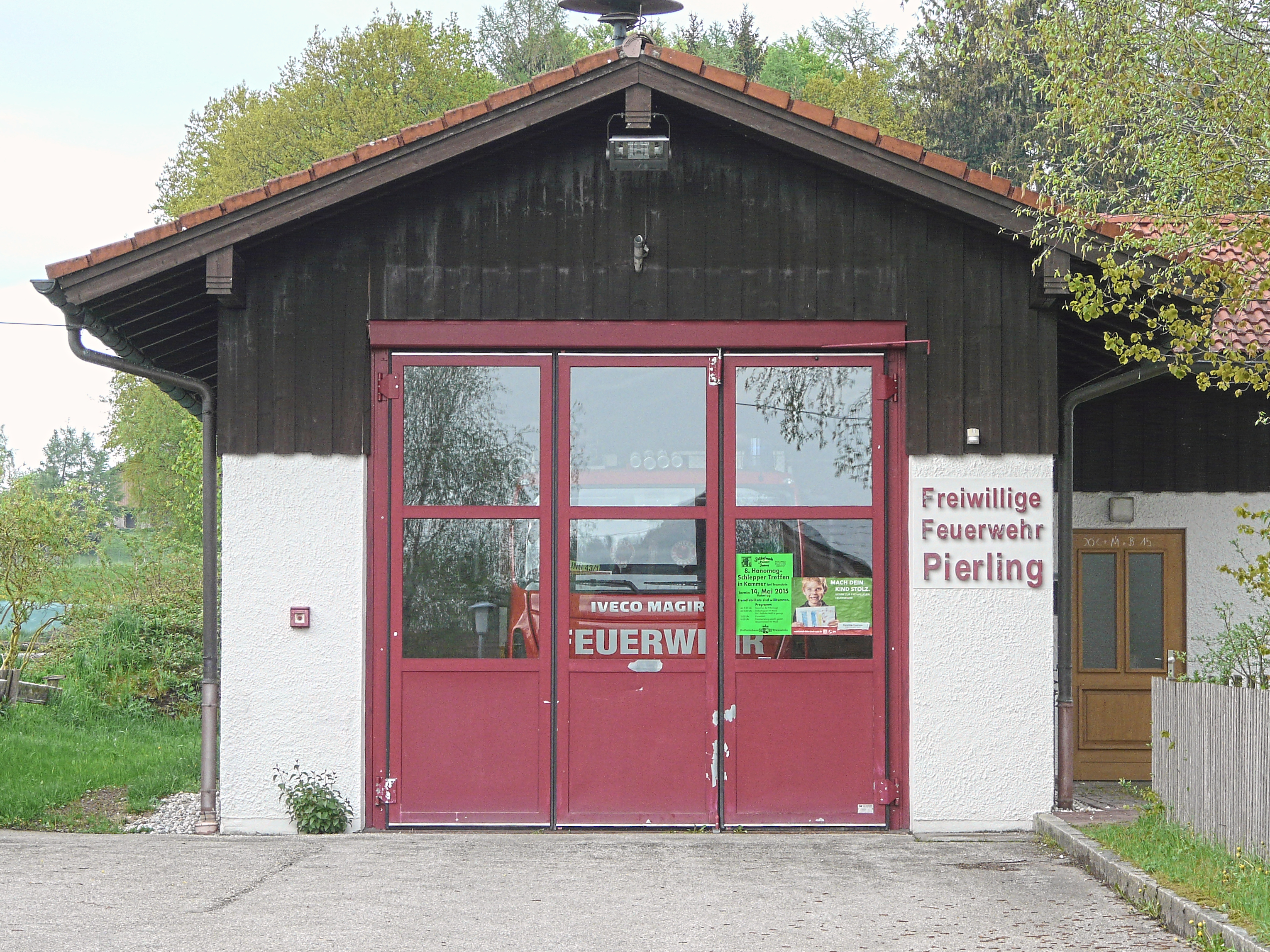 Gerätehaus der Freiwilligen Feuerwehr in Pierling, im Osten der Stadt Traunreut